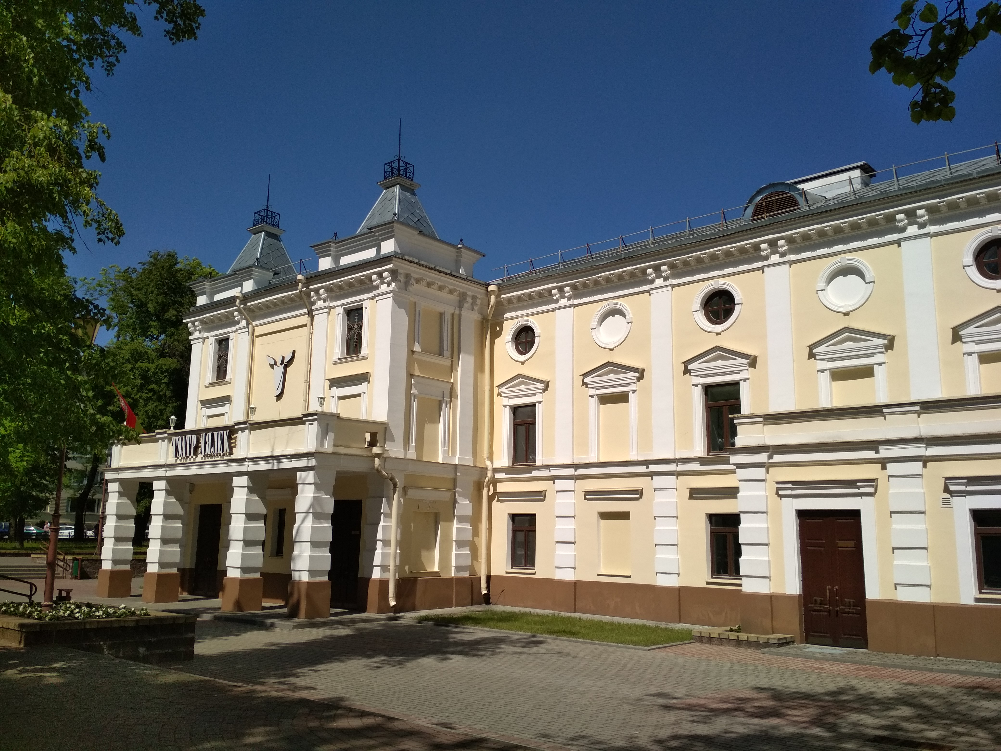 Гродна (2018). Парк Жылібера. Тэатр Тызенгаўза